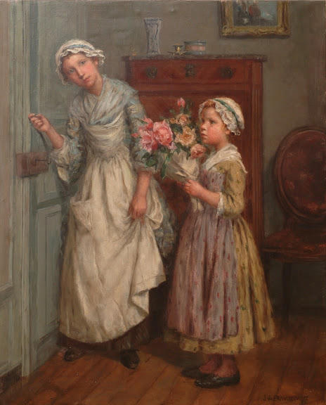 Peinture de Jean de FRANCQUEVILLE